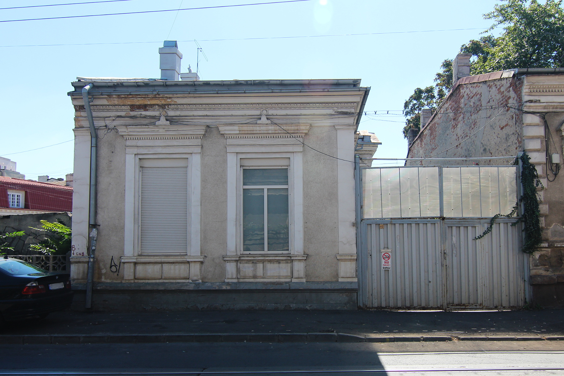 Casă pe Calea Călărașilor